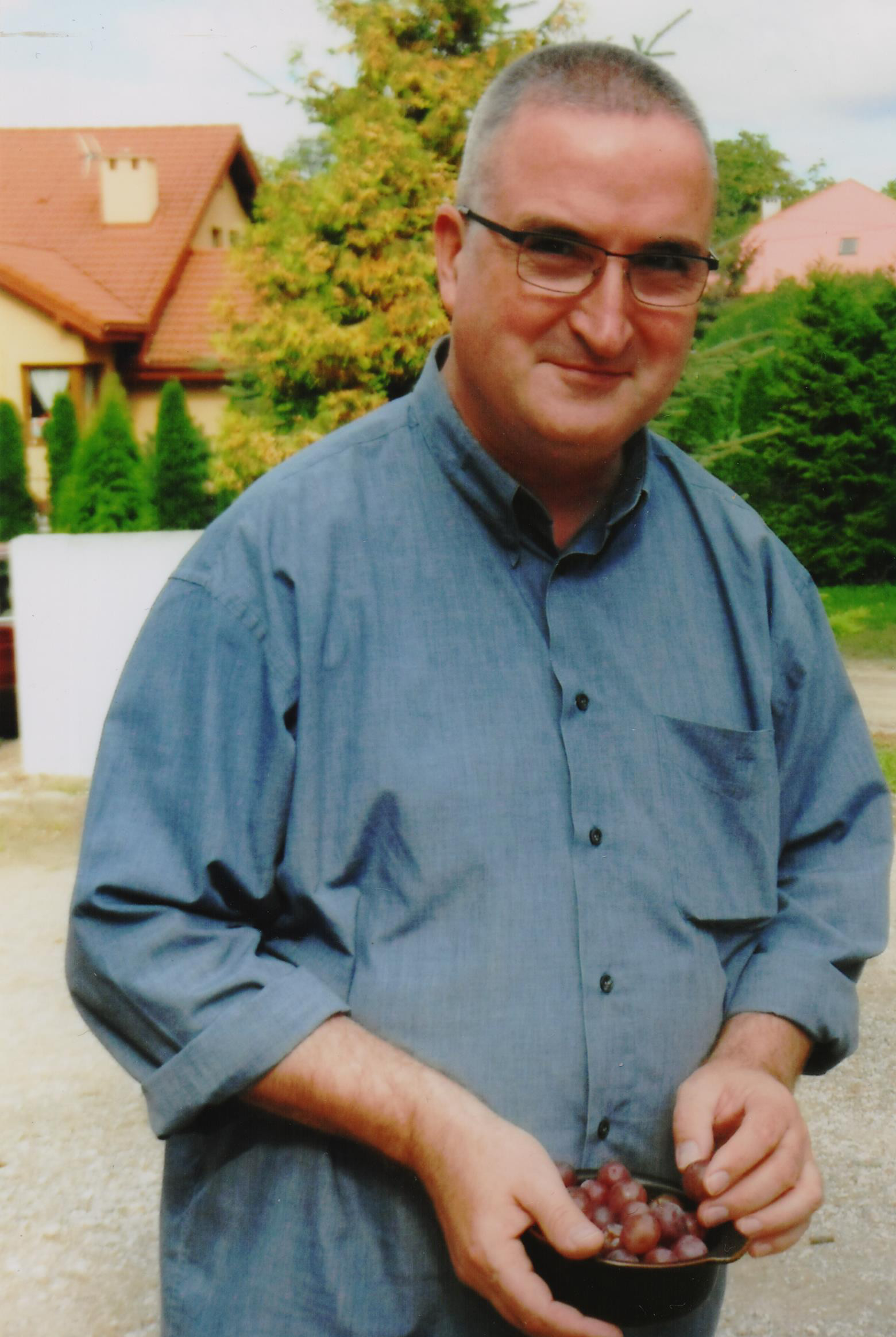 Henryk Błaszczyk, 18.09.2015.